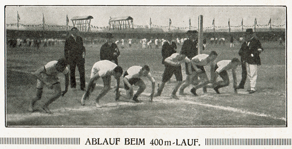 Deutsches Turnfest 1913 in Leipzig, Start 400-Meter-Lauf